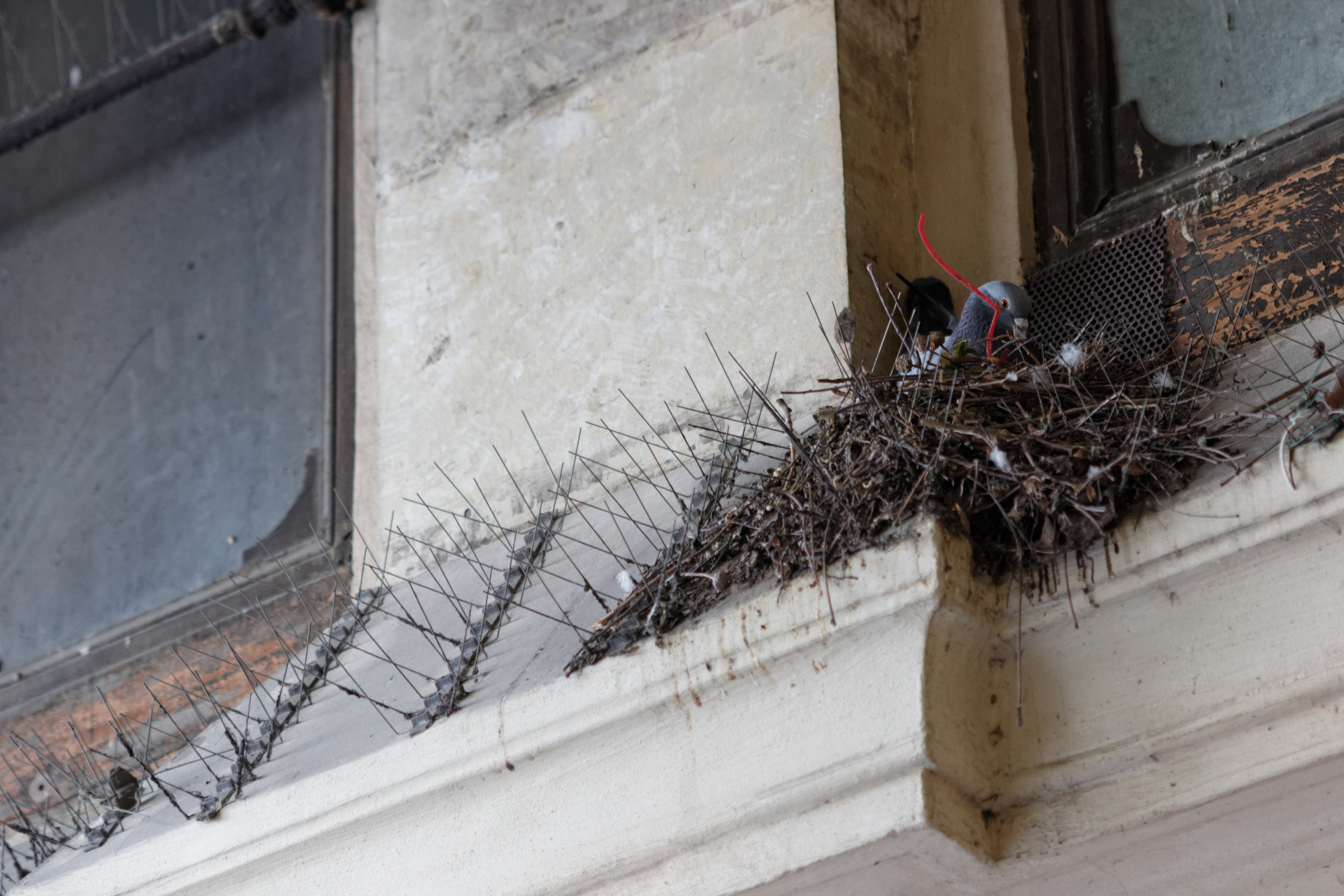 Passage Vendôme (Paris). Nid de pigeon dans les pics anti-pigeons.